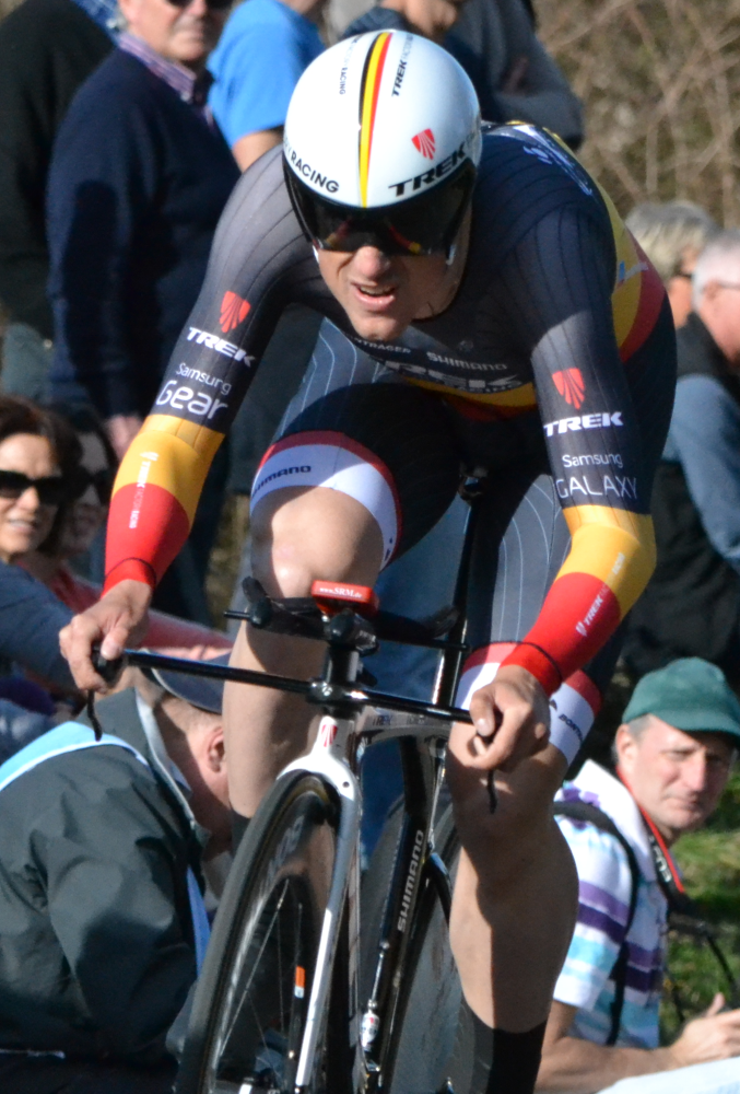 Paris-Nice 2015